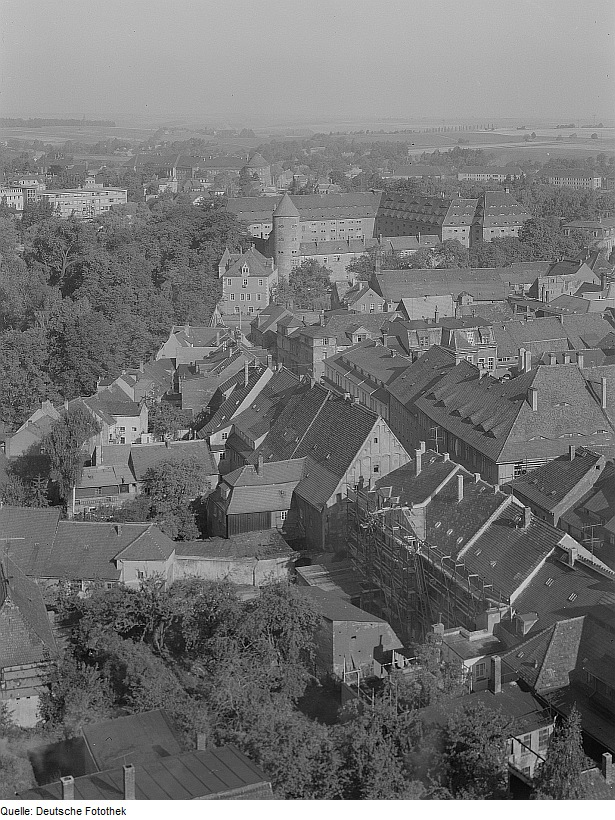 Original image description from the Deutsche Fotothek Freiberg. Ortsansicht mit Schloss Freudenstein